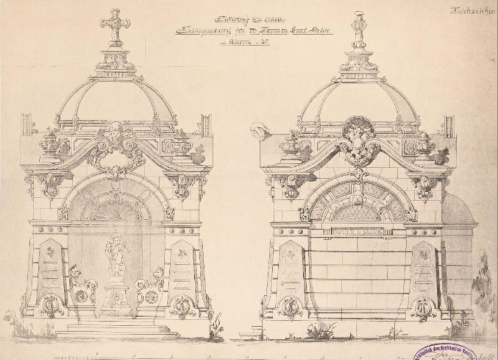 Entwurf für ein Mausoleum der Unternehmerfamilie Selve (Alter Friedhof Lüdenscheid)